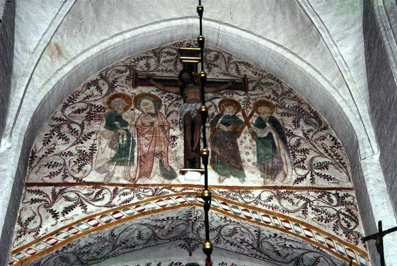 Vordingborg Vor Frue Kirke i Danmark. Triumfvæg